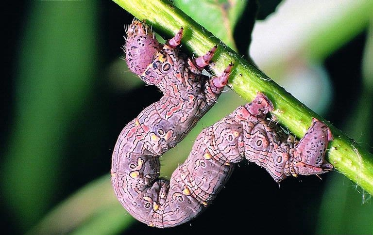 Lycia hirtaria larva